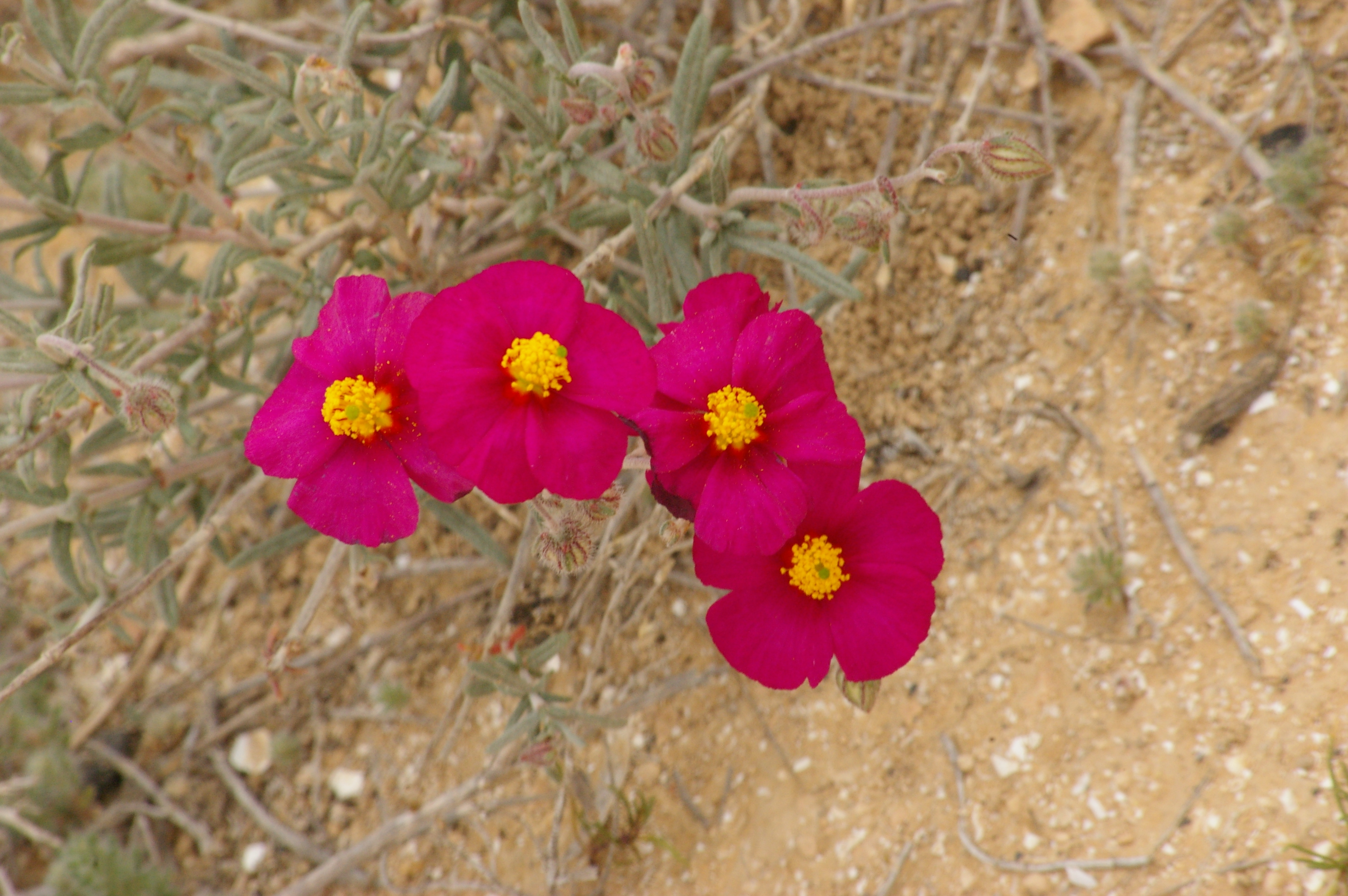 purple Helianthemum vesicarium